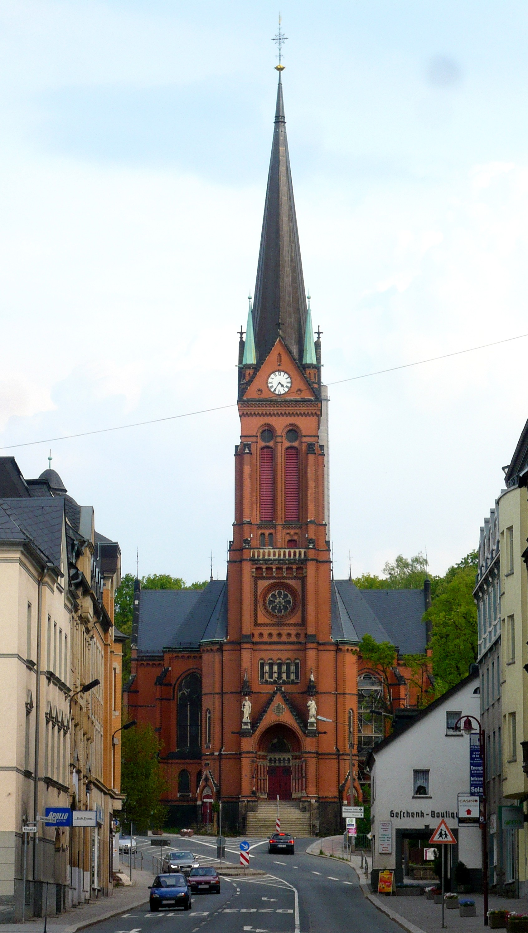 Aue, Westseite der St. Nikolaikirche